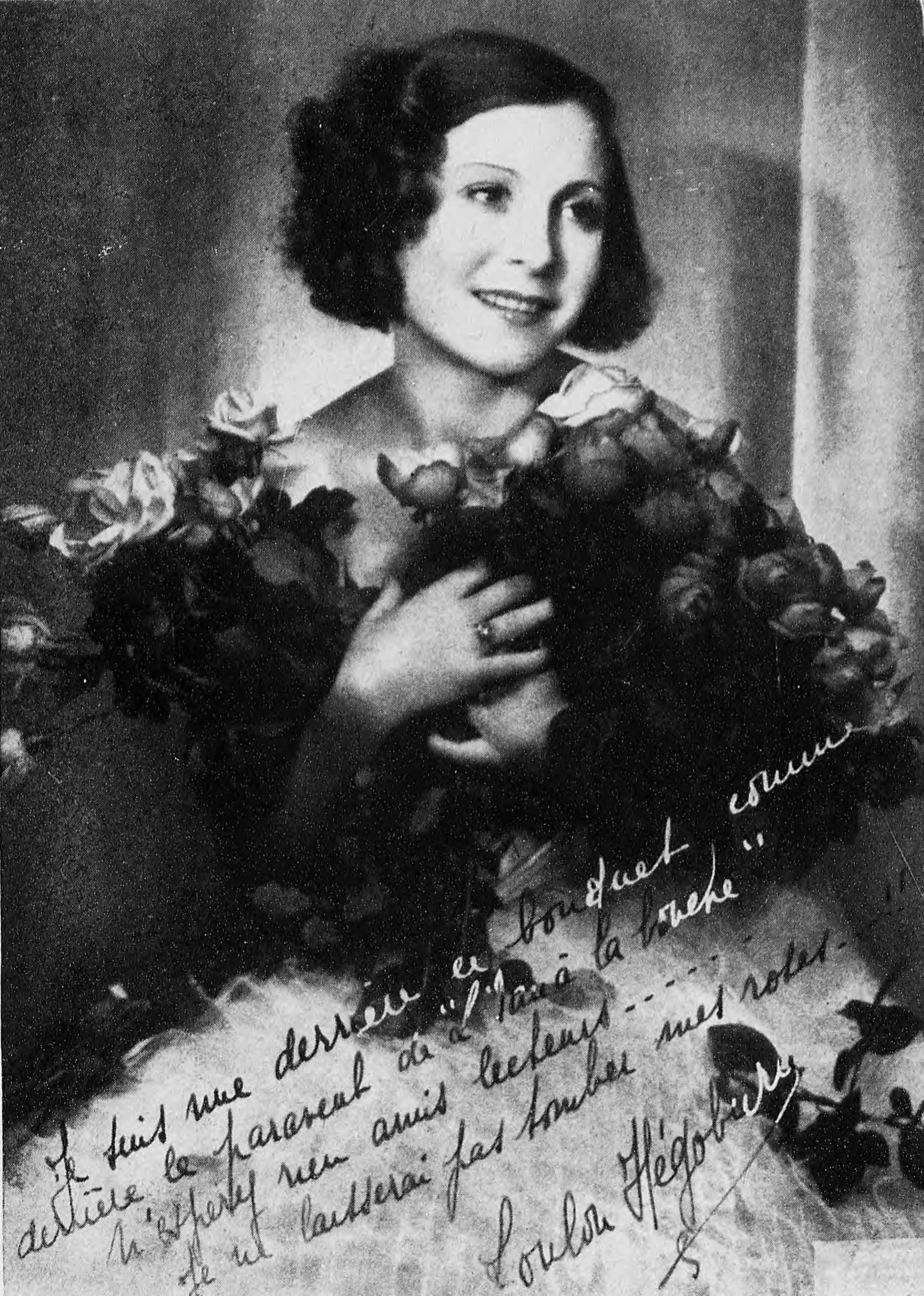 Loulou Hégoburu, photo parue dans La Vie parisienne du 13 janvier 1934